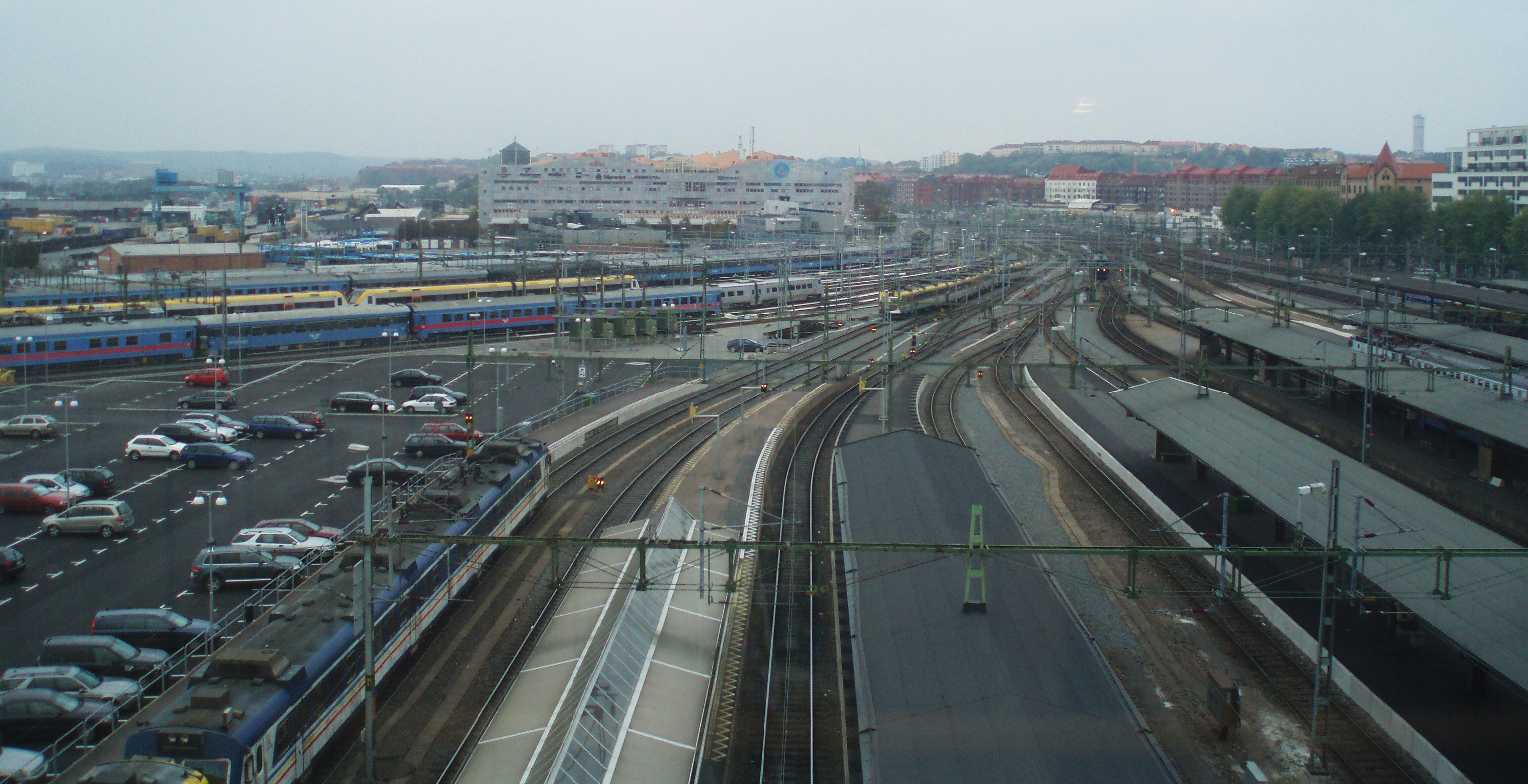 Utsikt över Göteborgs centralstations baksida.